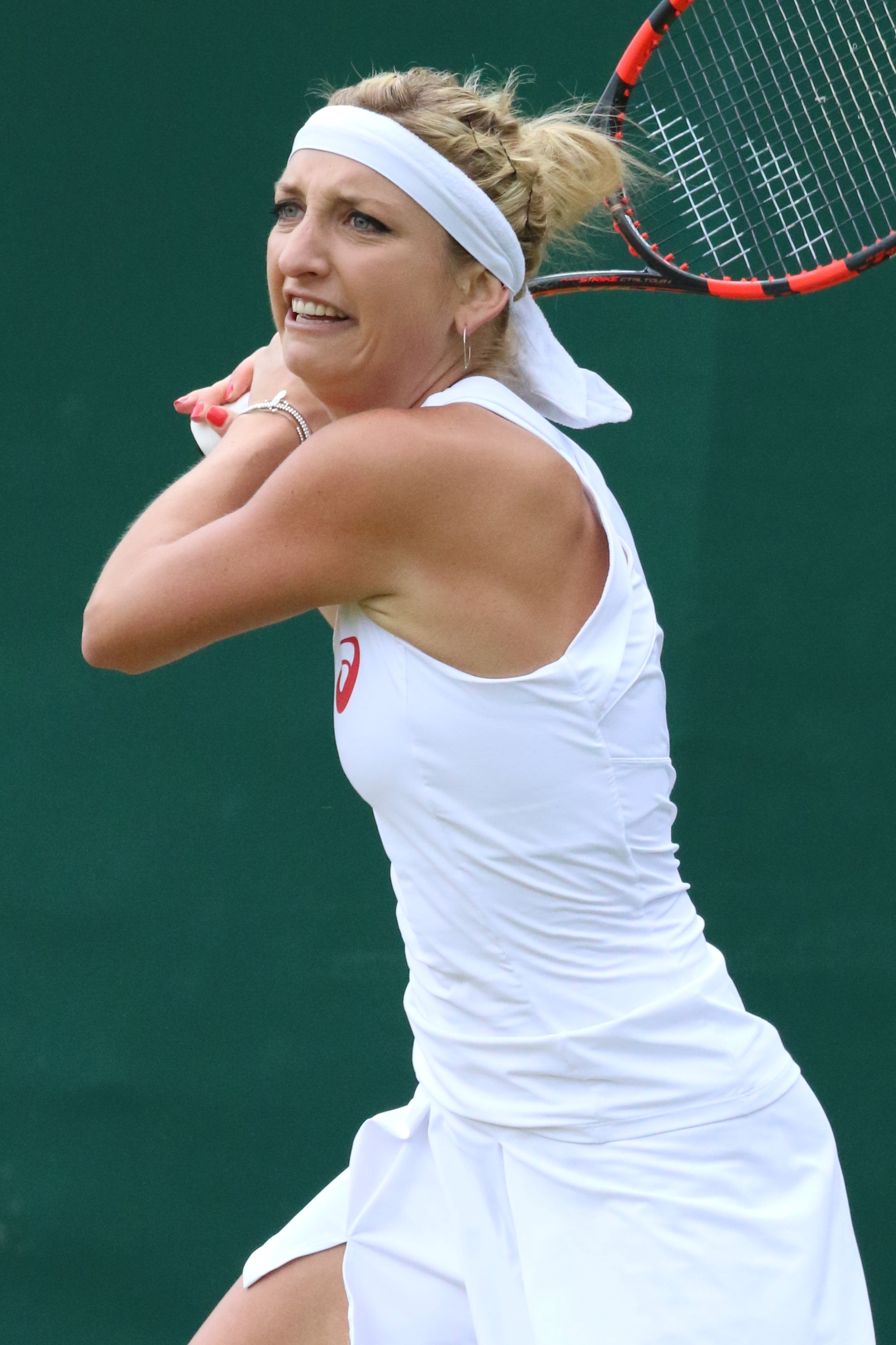 Bacsinszky WM16 (10)